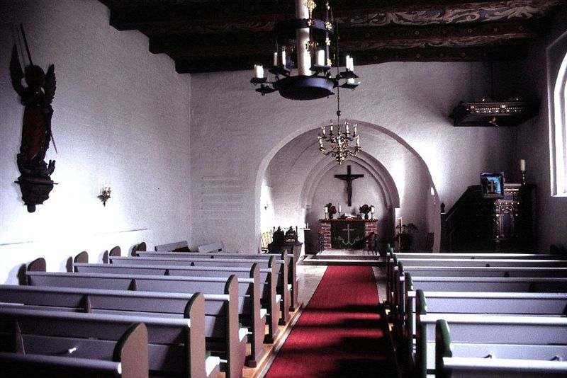 Rüllschau Kirke (Rylskov) i Danmark. Skibet set mod øst